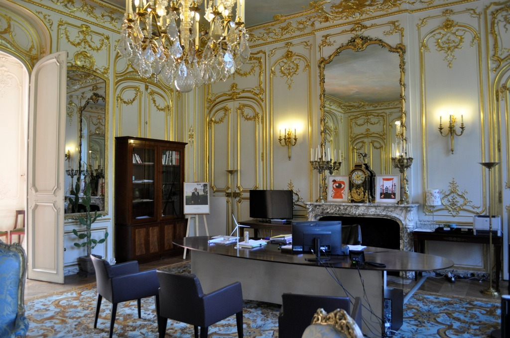 Façade de l'hôtel de Castries L'hôtel de Castries est situé au 72, rue de Varennes, dans le septième arrondissement de Paris. Journées européennes du patrimoine 2012 En 2012, cet hôtel est affecté au cabinet du ministère de l'Égalité des Territoires et du Logement. Le salon bleu est le bureau de la ministre Cécile Duflot.